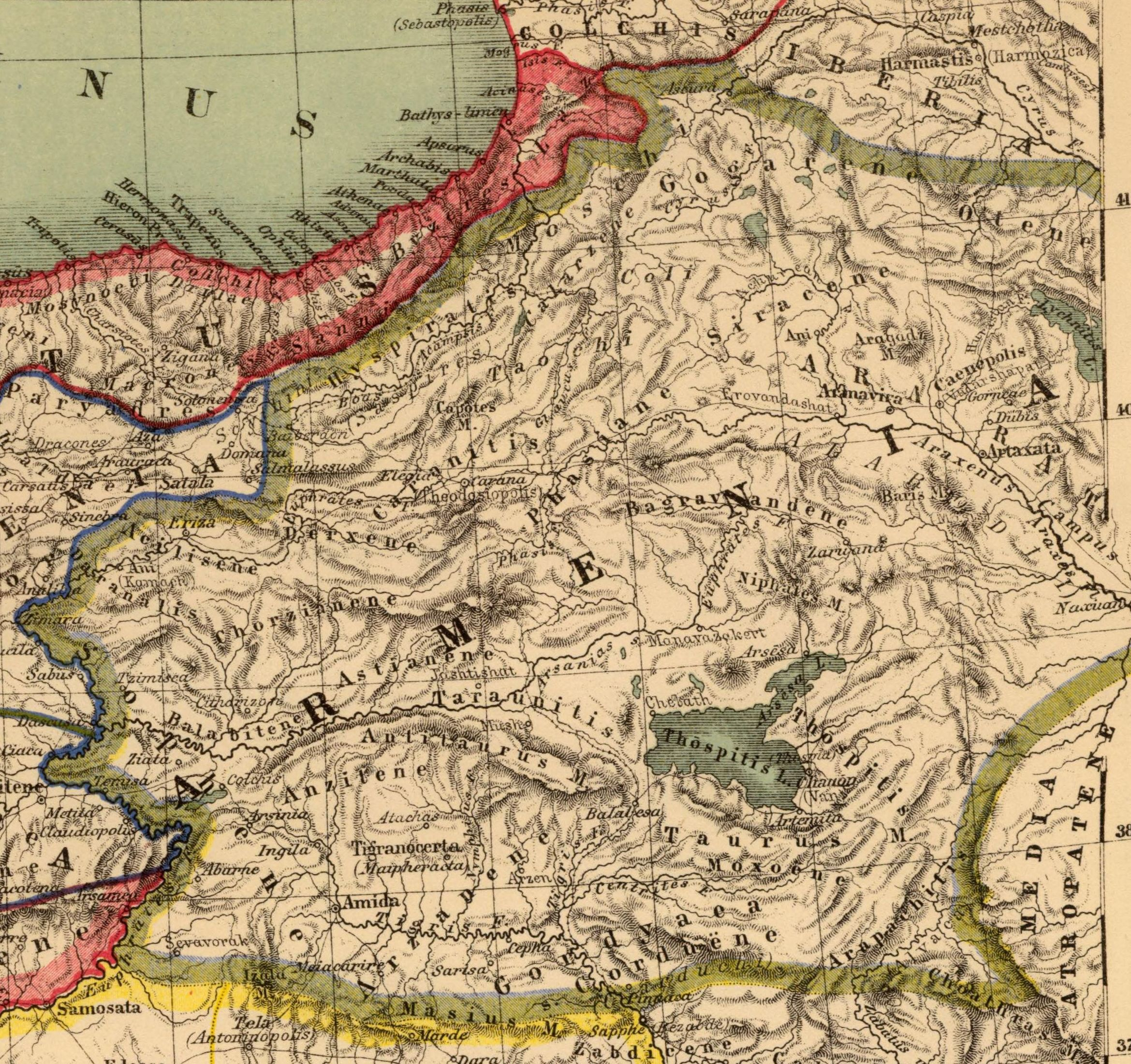 Armenia. Asia citerior. Auctore Henrico Kiepert Berolinensi. Geographische Verlagshandlung Dietrich Reimer (Ernst Vohsen) Berlin, Wilhemlstr. 29. (1903)